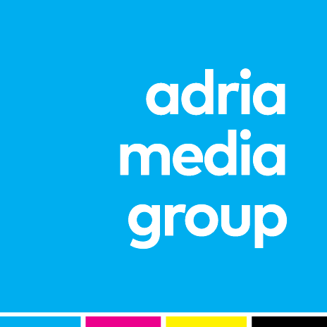 Srpskohrvatski / српскохрватски: Adria Media Group logo